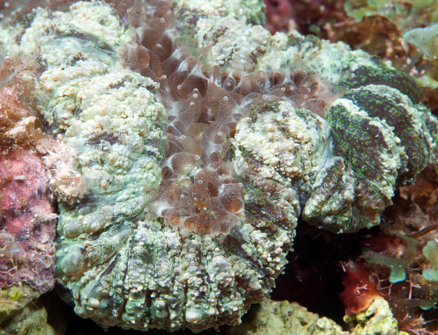 Mussa angulosa, pólipo individual con tentáculos extendidos, Florida